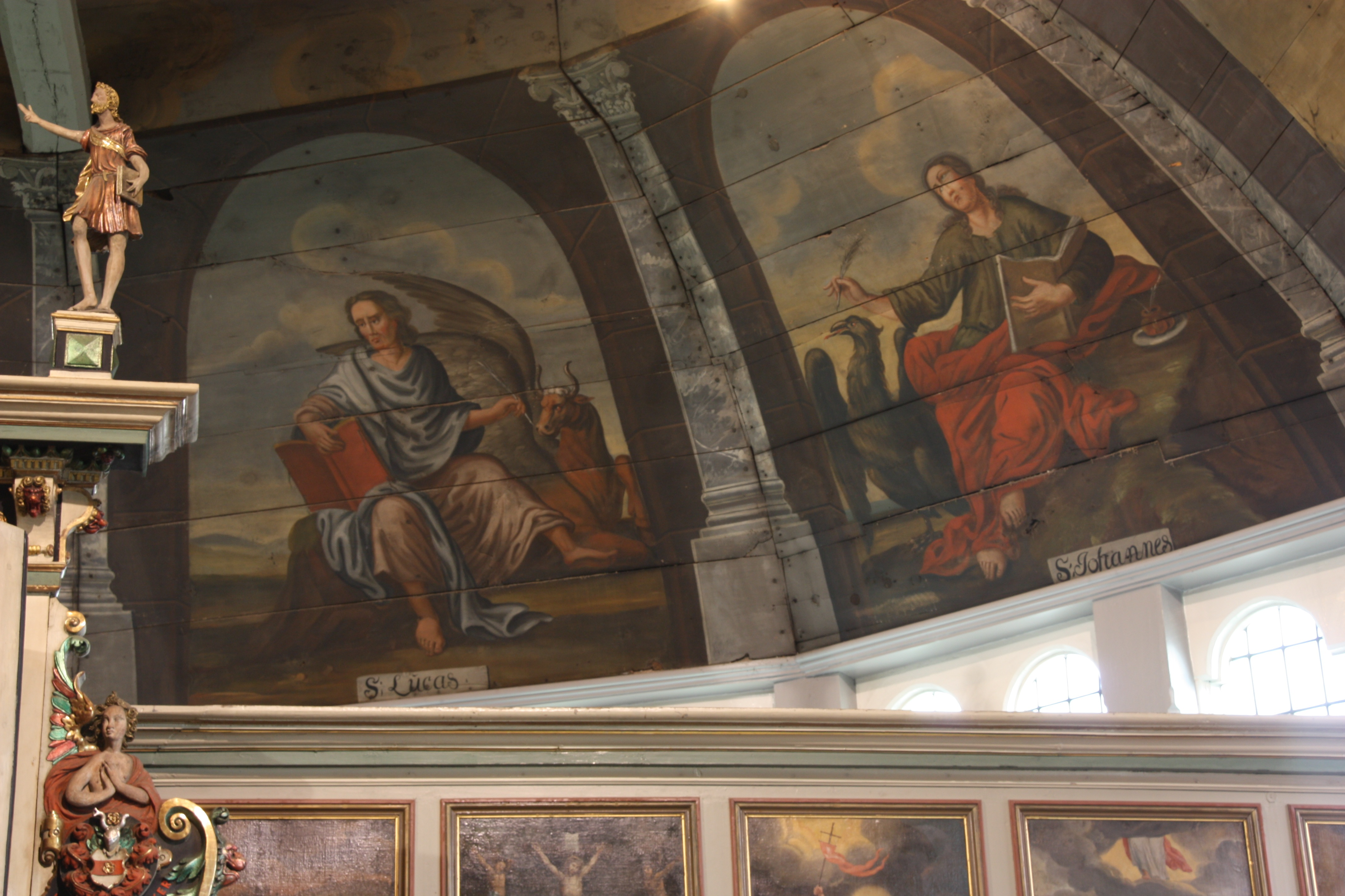 This is a photograph of an architectural monument. Hamburg, Allermöhe-Reitbrook, Dreieinigkeitskirche, Innenraum, Deckenbilder im Chor